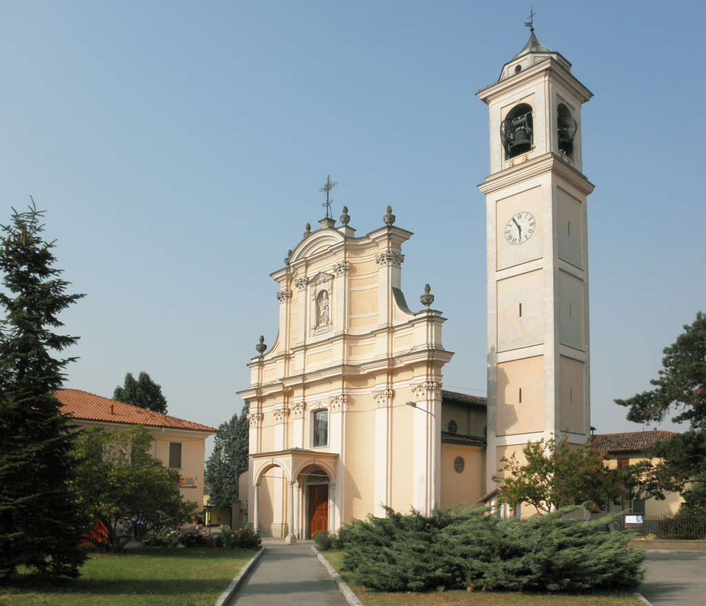 Casalmaiocco, la chiesa parrocchiale di San Martino Vescovo.